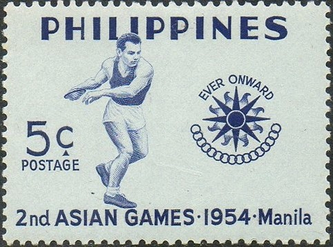 1954 Asian Games